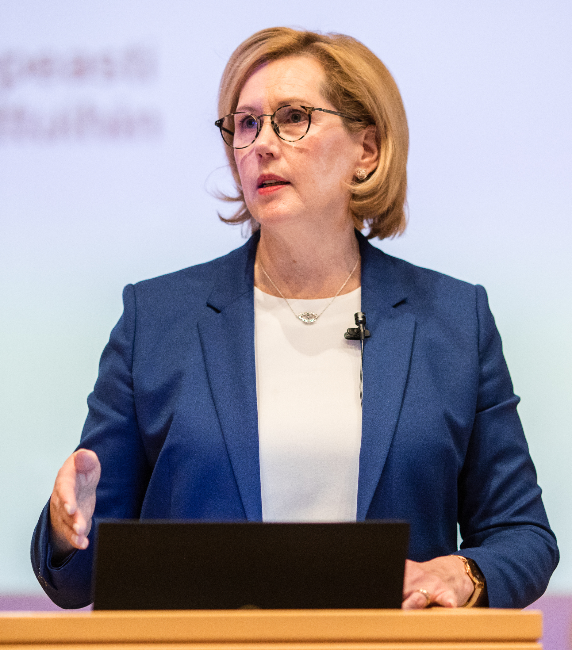 Hallituksen ja hallituspuolueiden ilmastokokouksen toinen päivä, työllisyystoimien tilannekatsaus. Puheenvuoro: Työministeri Tuula Haatainen © Laura Kotila | valtioneuvoston kanslia